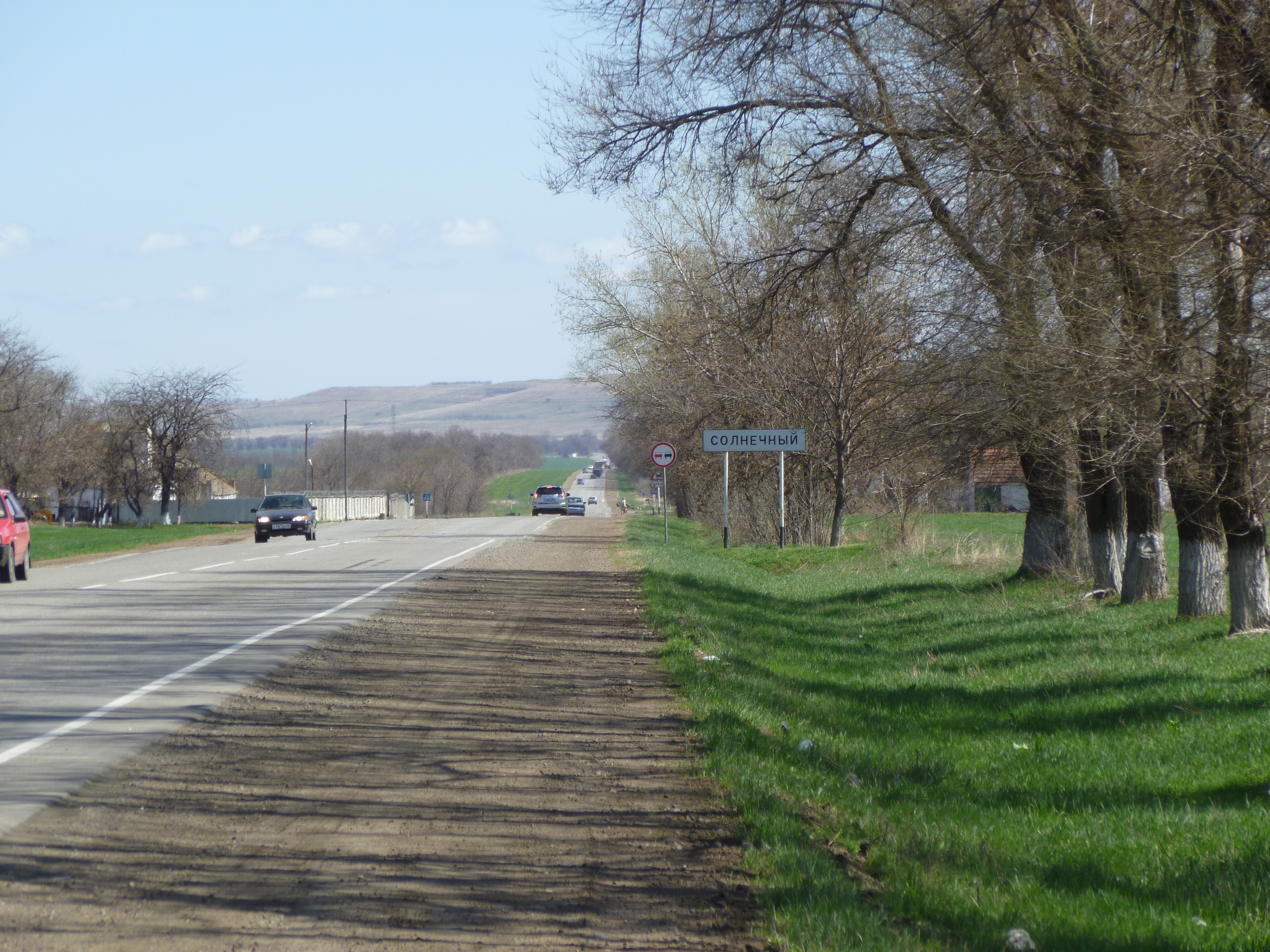 Поселок Солнечный